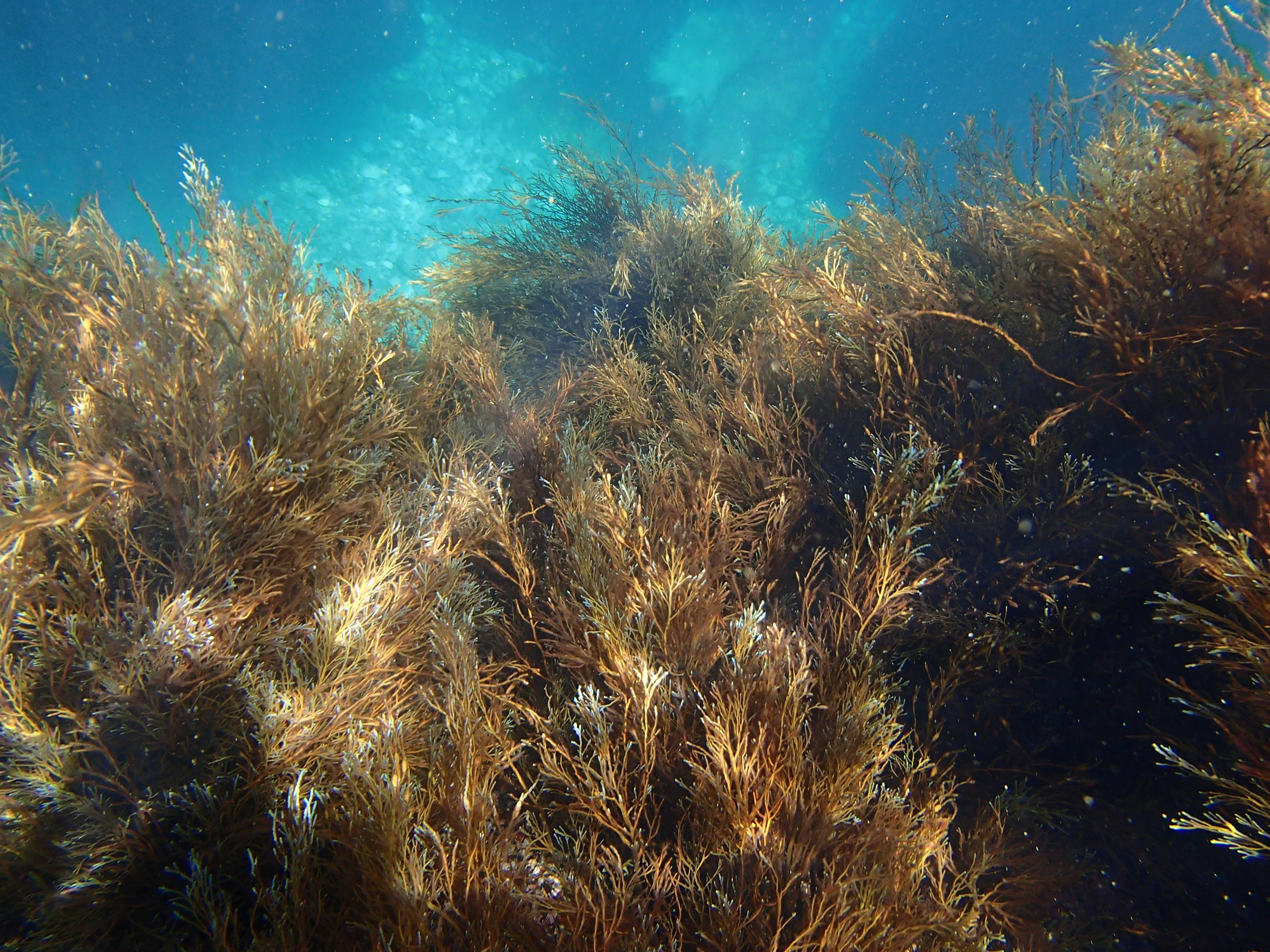 Біотоп М1.1.1 Угруповання цистозіри на скелях та інших твердих субстратах